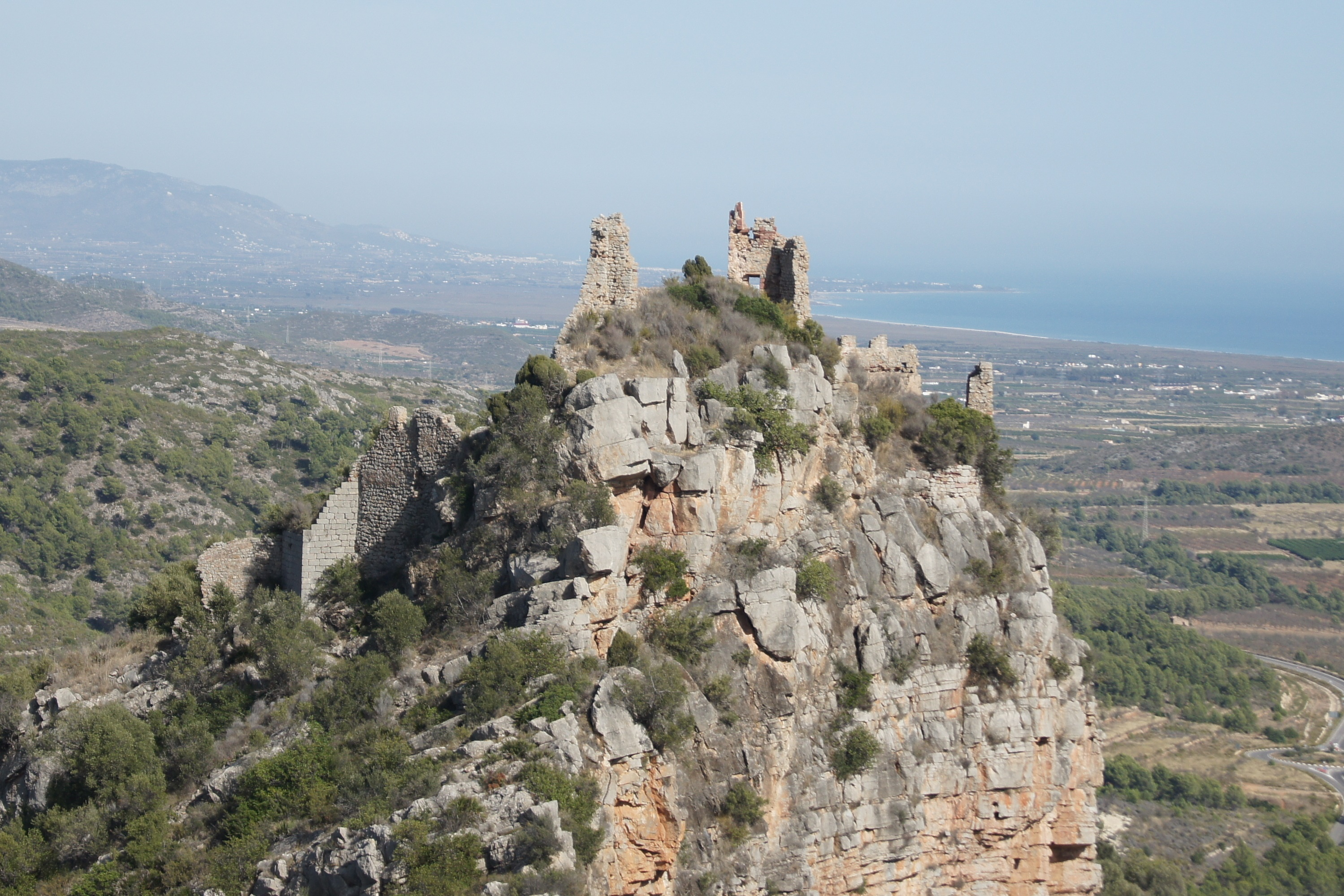 Castillo de Miravet, en el municipio de Cabanes, Castellón. Fortaleza de origen árabe del siglo X